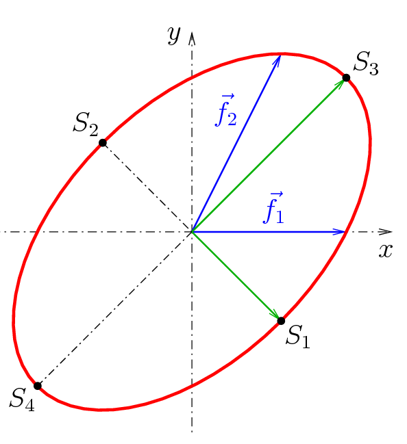 Ellipse: Transformation auf Scheitelform